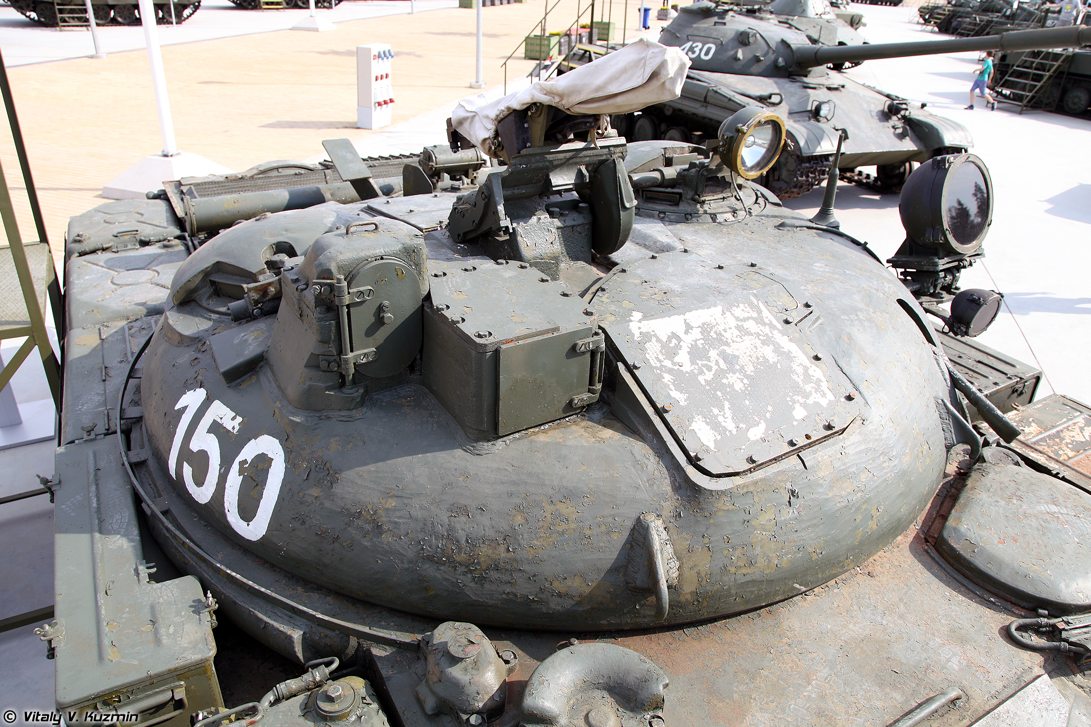 Ракетный танк ИТ-1 (Missile tank IT-1)